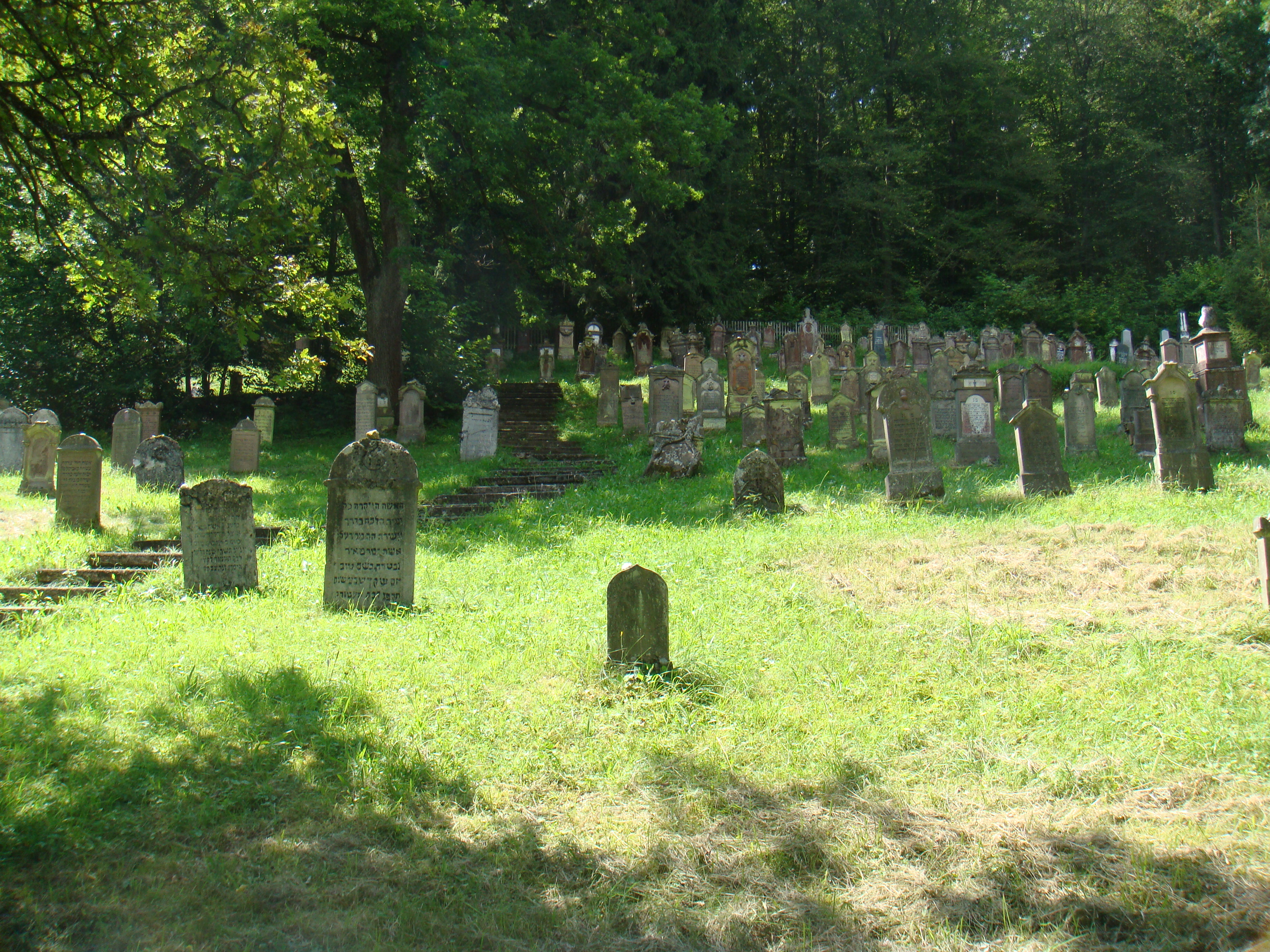 Jüdischer Friedhof in Buttenhausen im Lautertal